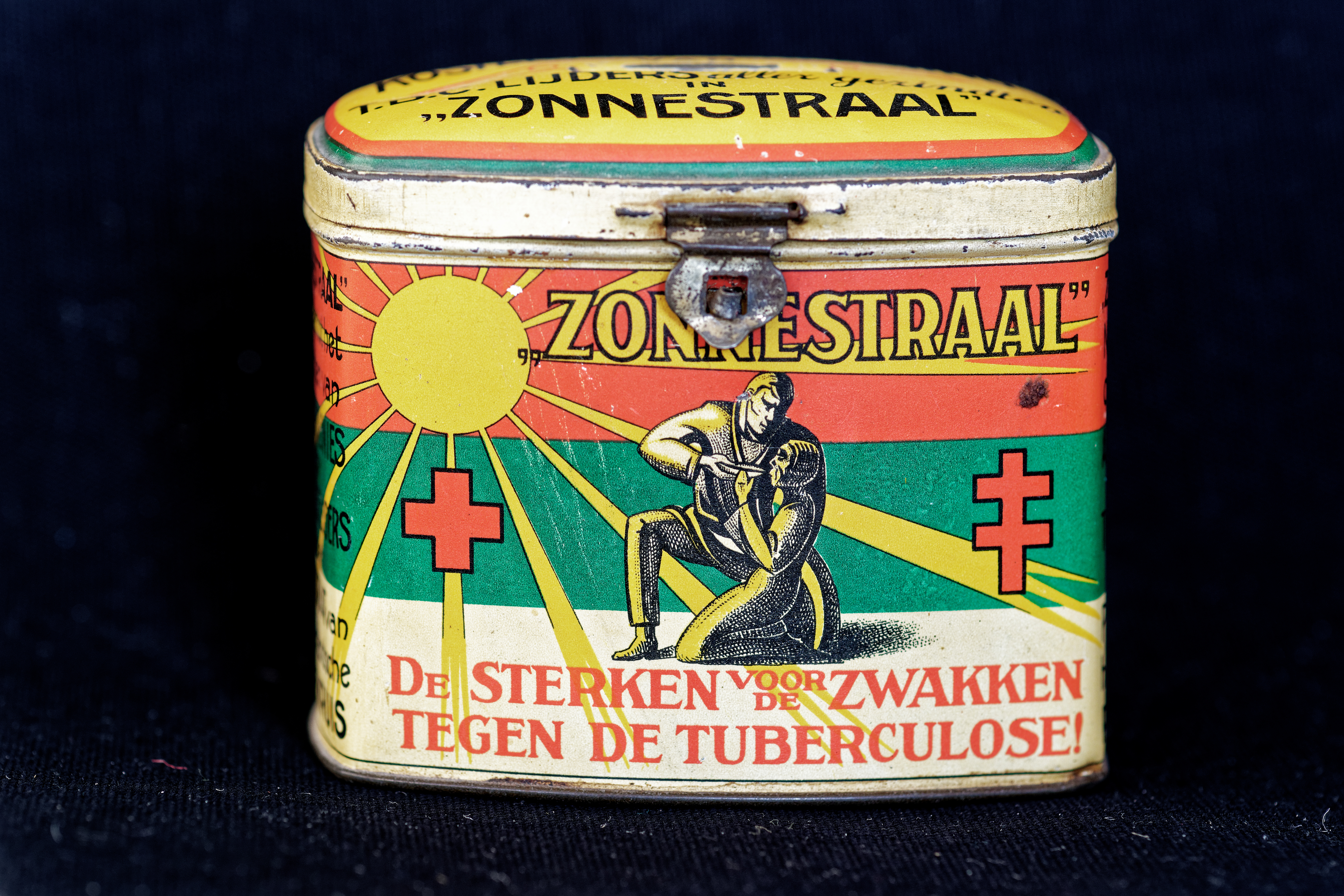 Collectebusje "Zonnestraal" voor bij donateurs thuis. Regelmatig kwam er een vrijwilliger langs om het te legen en het verzamelde geld te tellen.